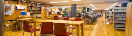 Sala de lectura de la Biblioteca Municipal Forum en La Coruña